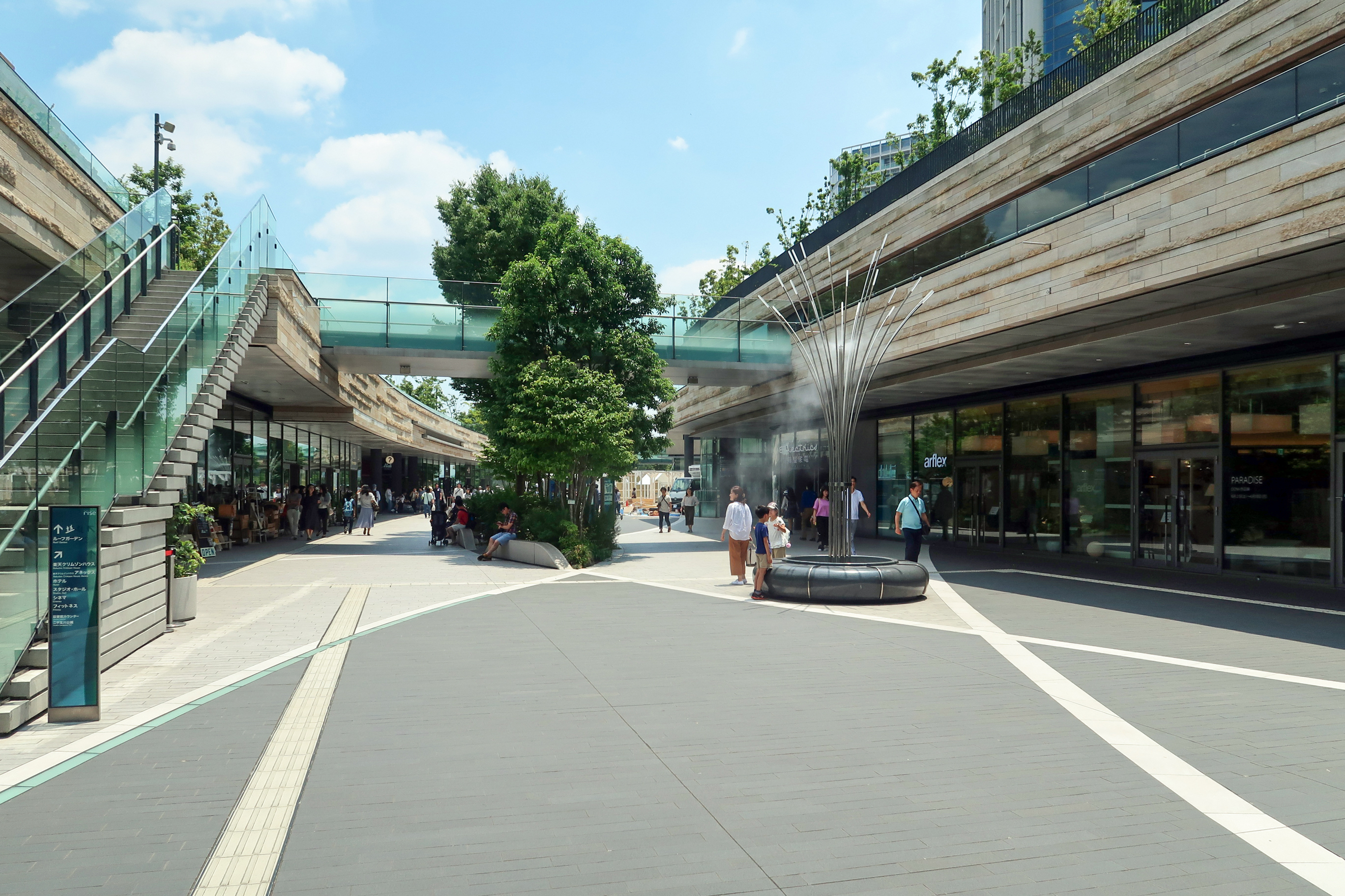 Futako-Tamagawa Rise Shopping Center terrace market